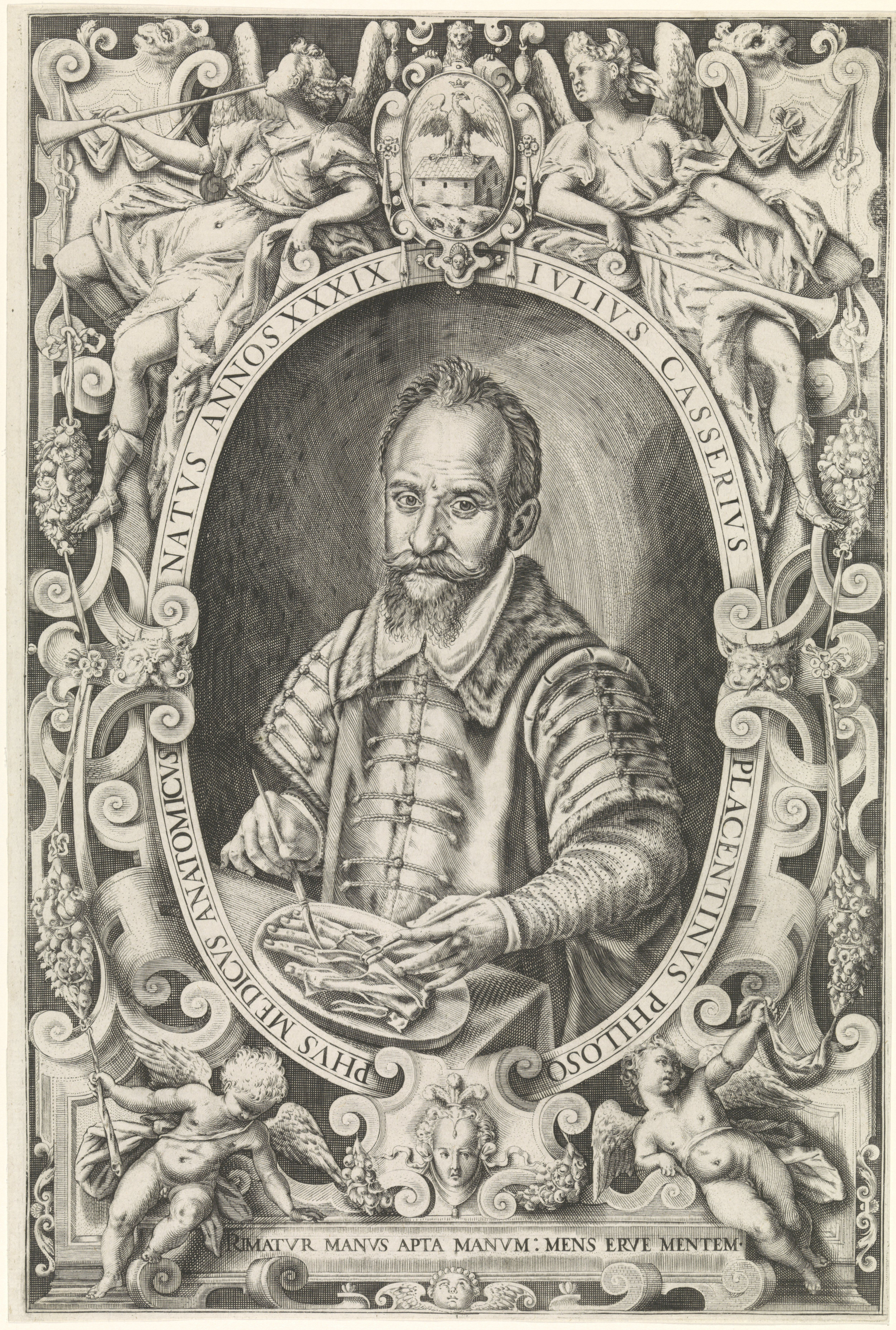 IdentificatieTitel(s): Portret van Julius Casserius, anatoom in PaduaObjecttype: prent Objectnummer: RP-P-1938-574Opschriften / Merken: verzamelaarsmerk, verso, gestempeld: Lugt 2228VervaardigingVervaardiger: prentmaker: Gijsbert van Veen (mogelijk)Datering: 1591Fysieke kenmerken: gravureMateriaal: papier Techniek: graveren (drukprocedé)Afmetingen: blad: h 368 mm × b 246 mmToelichtingPretn ook gebruikt als boekillustratie in: Casserius, Julius. De Vocis Auditusque organis. Ferrara, 1600. In inventarisboek: P. van Schuppen sc. naar N. de Largillière/ Portret van Nic. Joseph Foveault/ op Fransche graveurs.OnderwerpWat: handanatomy lessonWie: Julius CasseriusVerwerving en rechtenVerwerving: onbekendCopyright: Publiek domein